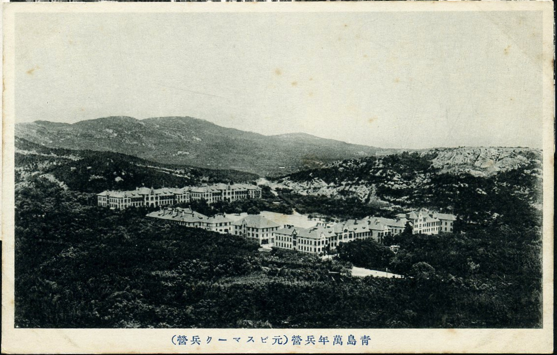 青岛俾斯麦兵营旧址，日治时期明信片